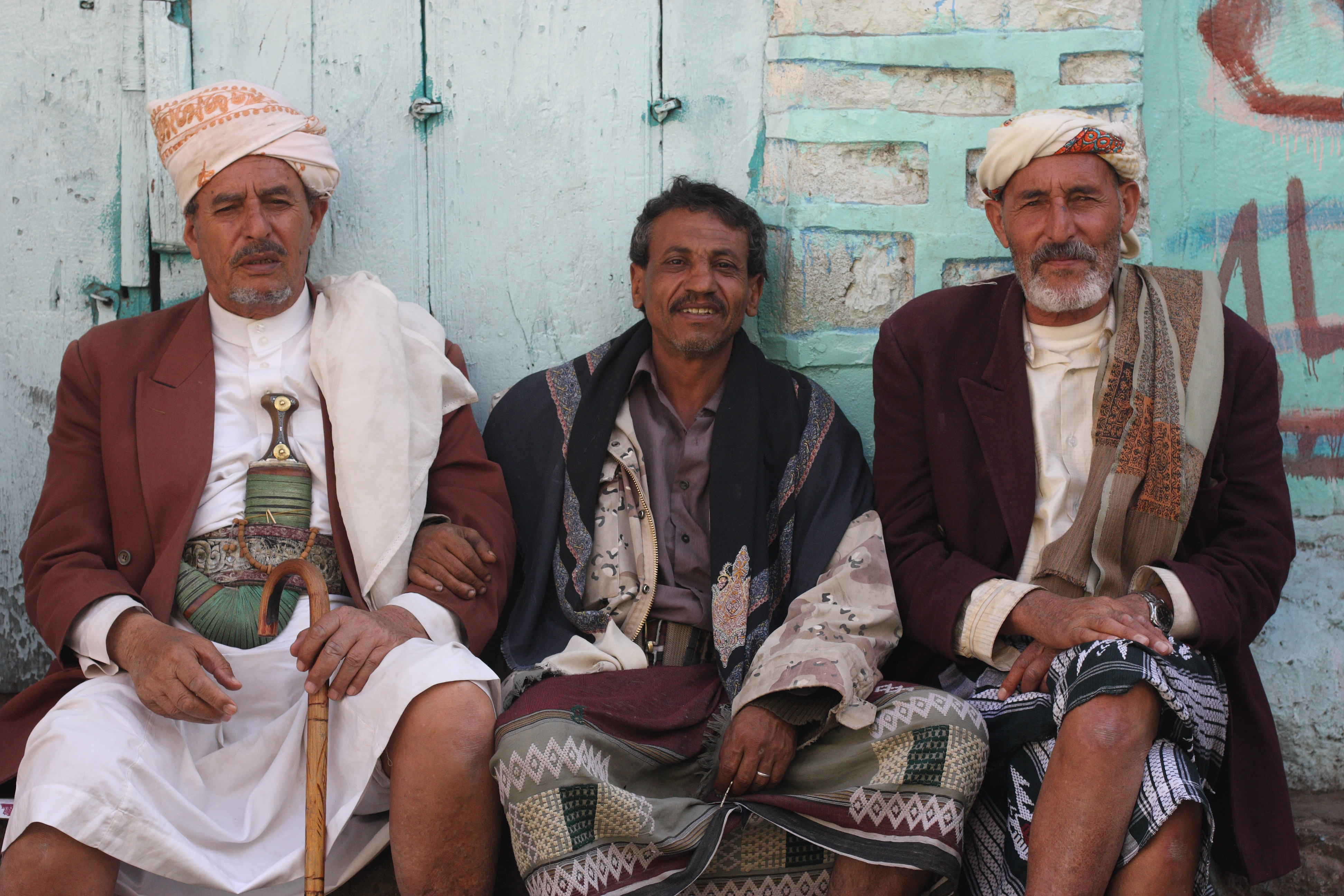 Yemeni men in Ibb